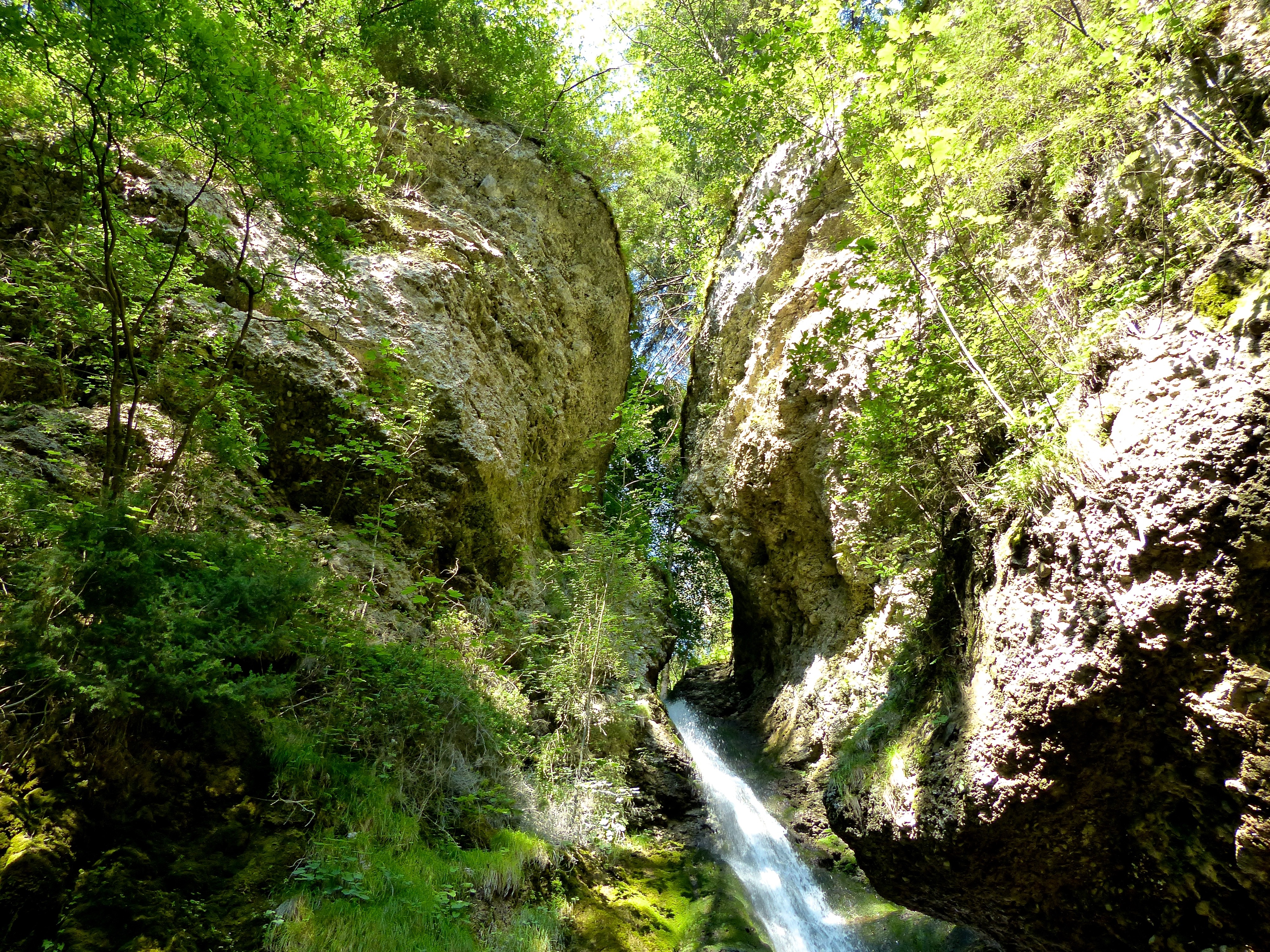 Geotop Wasserfall Hinang: eiszeitliche Terrassenkante am Hinanger Wasserfall